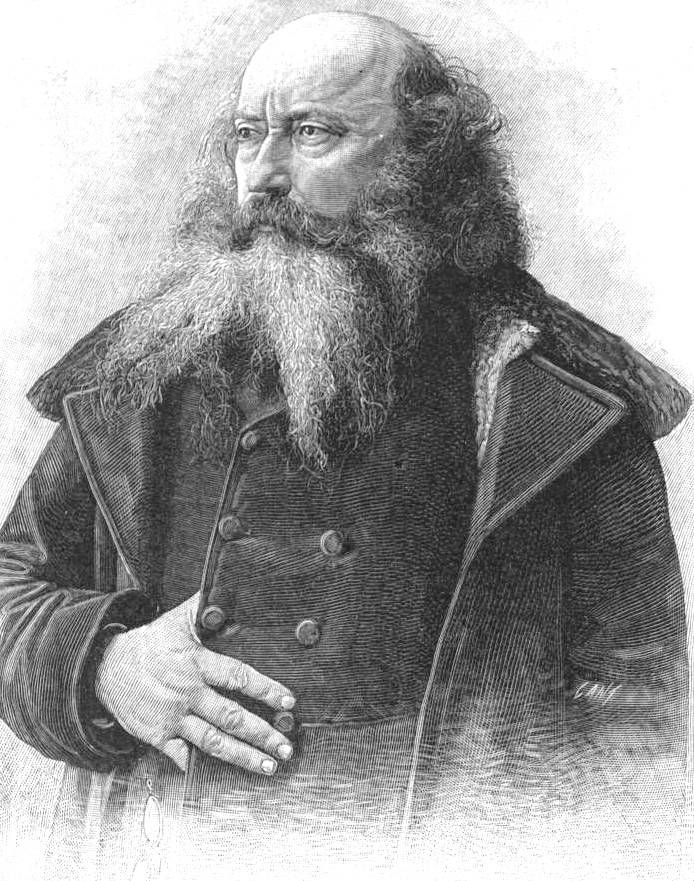 Pietro Sbarbaro